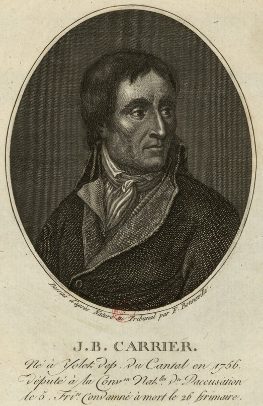 J.B. Carrier né à Yolet dep. du Cantal en 1756. député à la Conv. on nat.lles d.te d accusation le 5 fri.re condamné à mort le 26 frimaire (estampe)